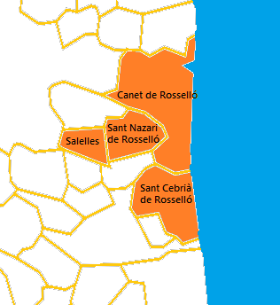 Mapa del Cantó de la Costa Sorrosa elaborat a partir d'un mapa de lliure disposició